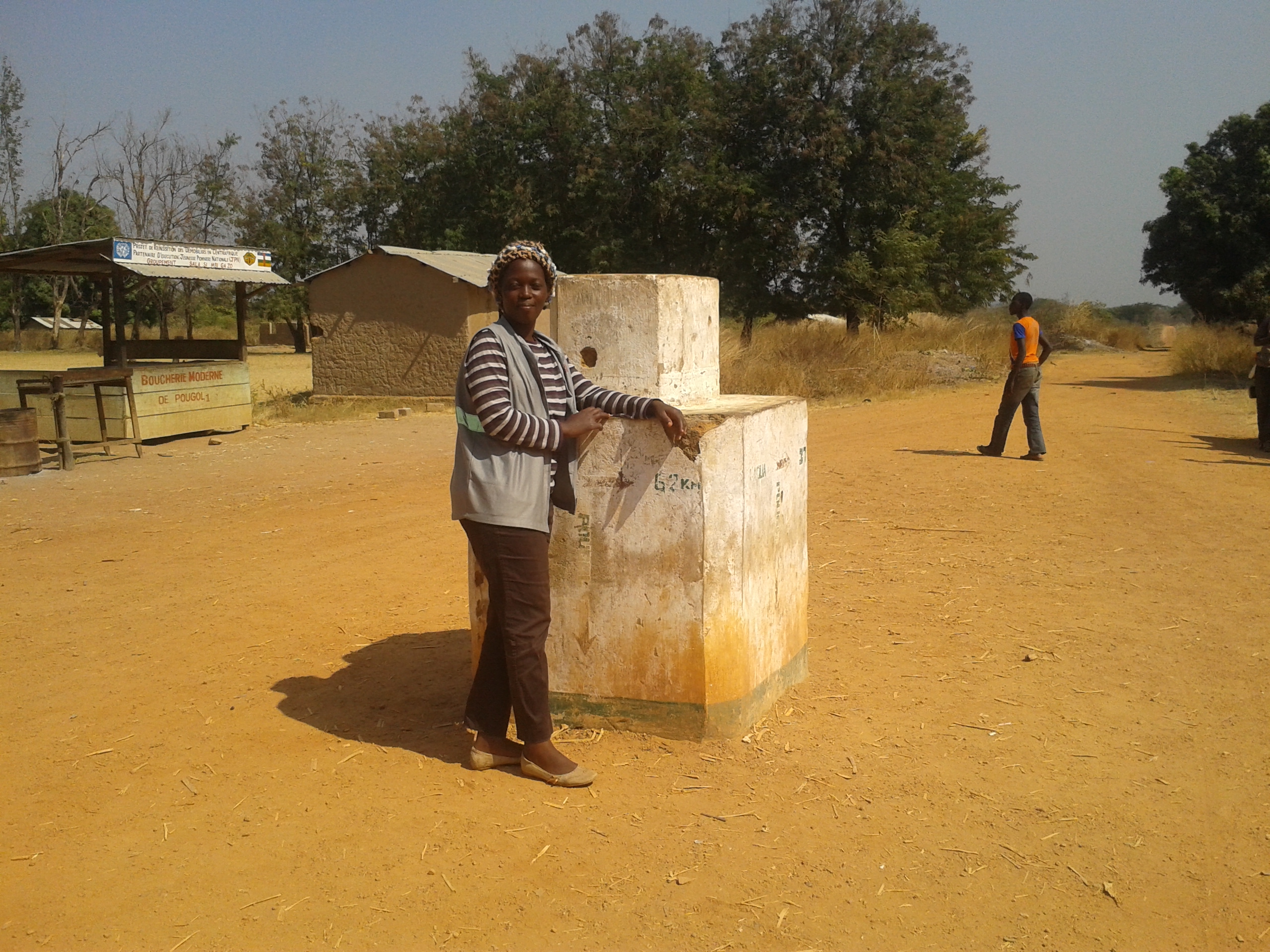 Rond point vers Pendé à Paoua en Centrafrique This is an image of Cultural Fashion or Adornment from Central African Republic